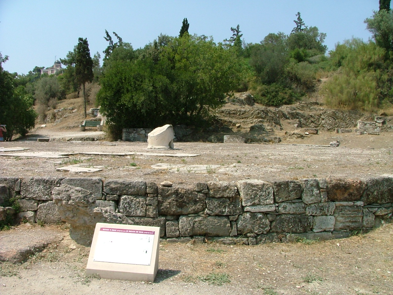 Tholos del Ágora de Atenas